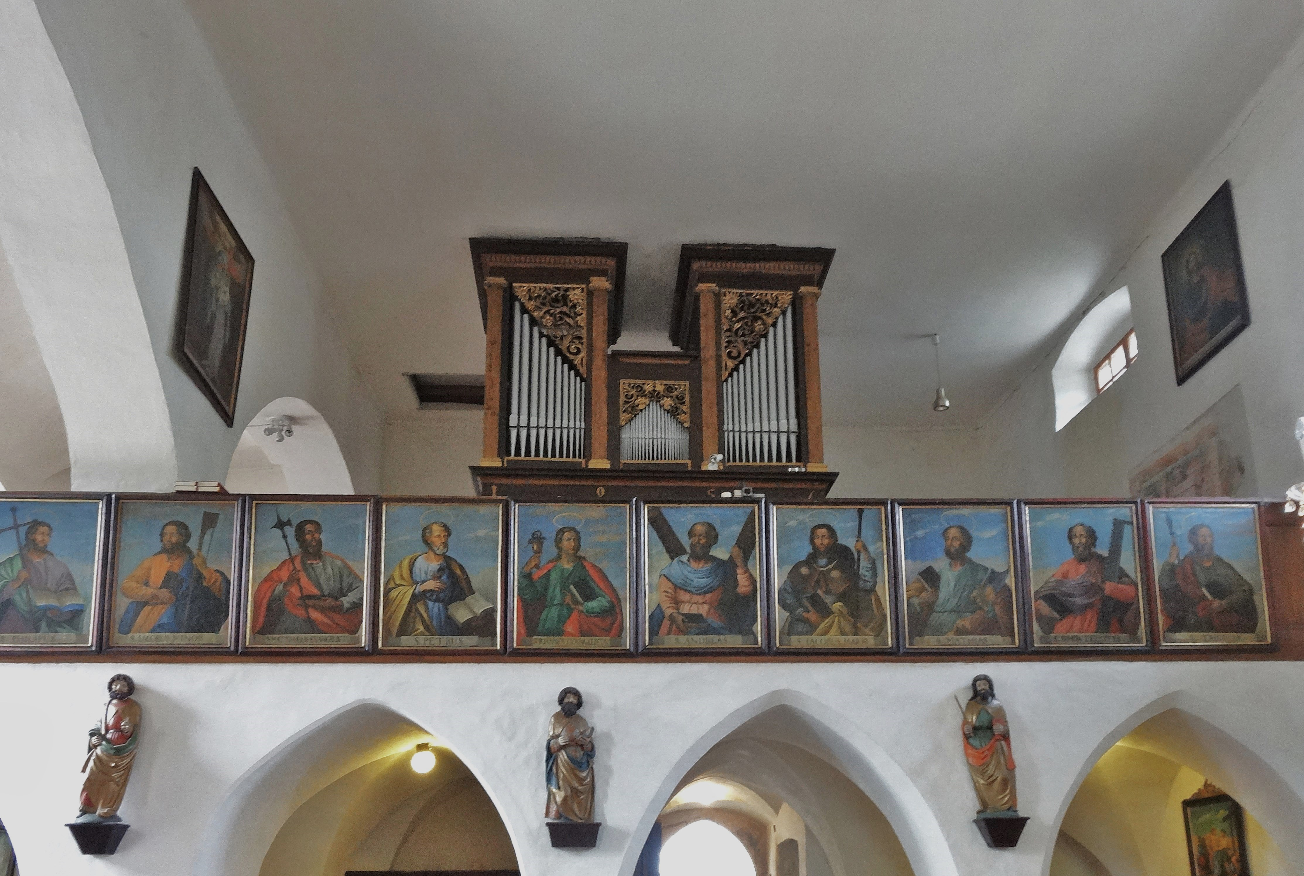 Kath. Pfarrkirche hl. Jakobus der Ältere, Blick zur Empore